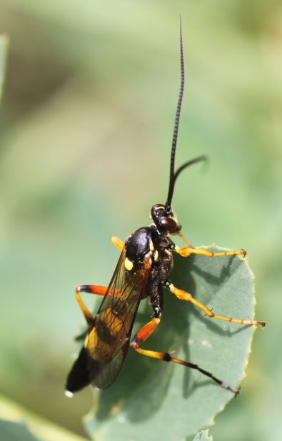 Diphyus quadripunctorius, Männchen, am 9.5.2017 am Rheinufer südlich von Mannheim